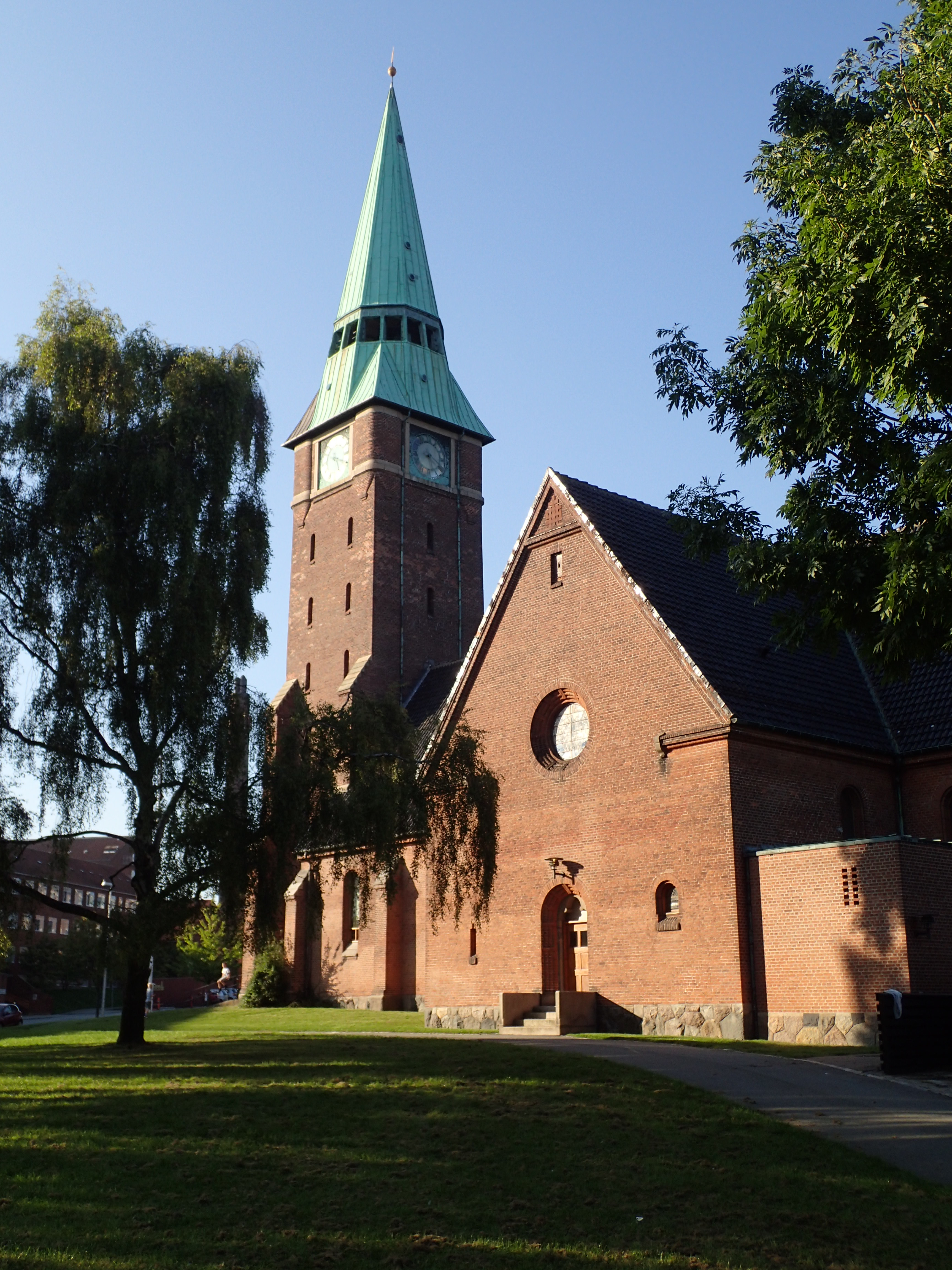 Sankt Johannes Kirke (Aarhus)